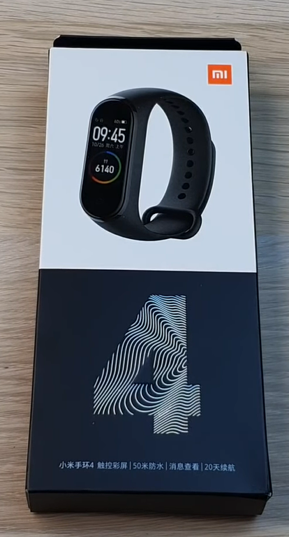 Упаковка (коробка) фитнес-браслета Mi Band 4